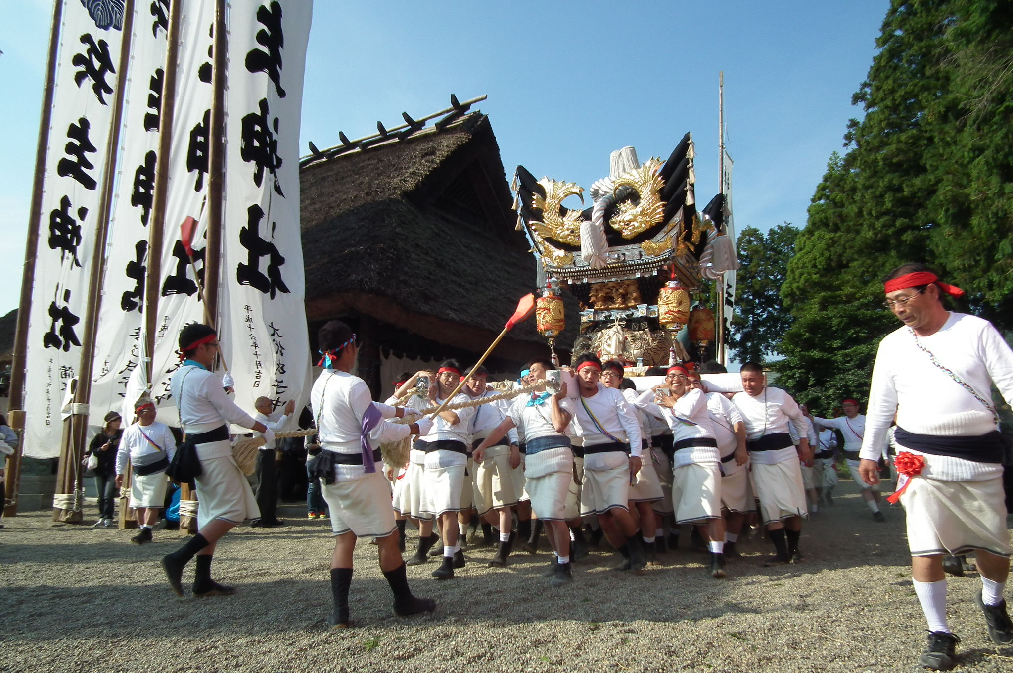 2011.10.9 Hyozu-jinja 兵主神社例祭（西脇市黒田庄町岡）